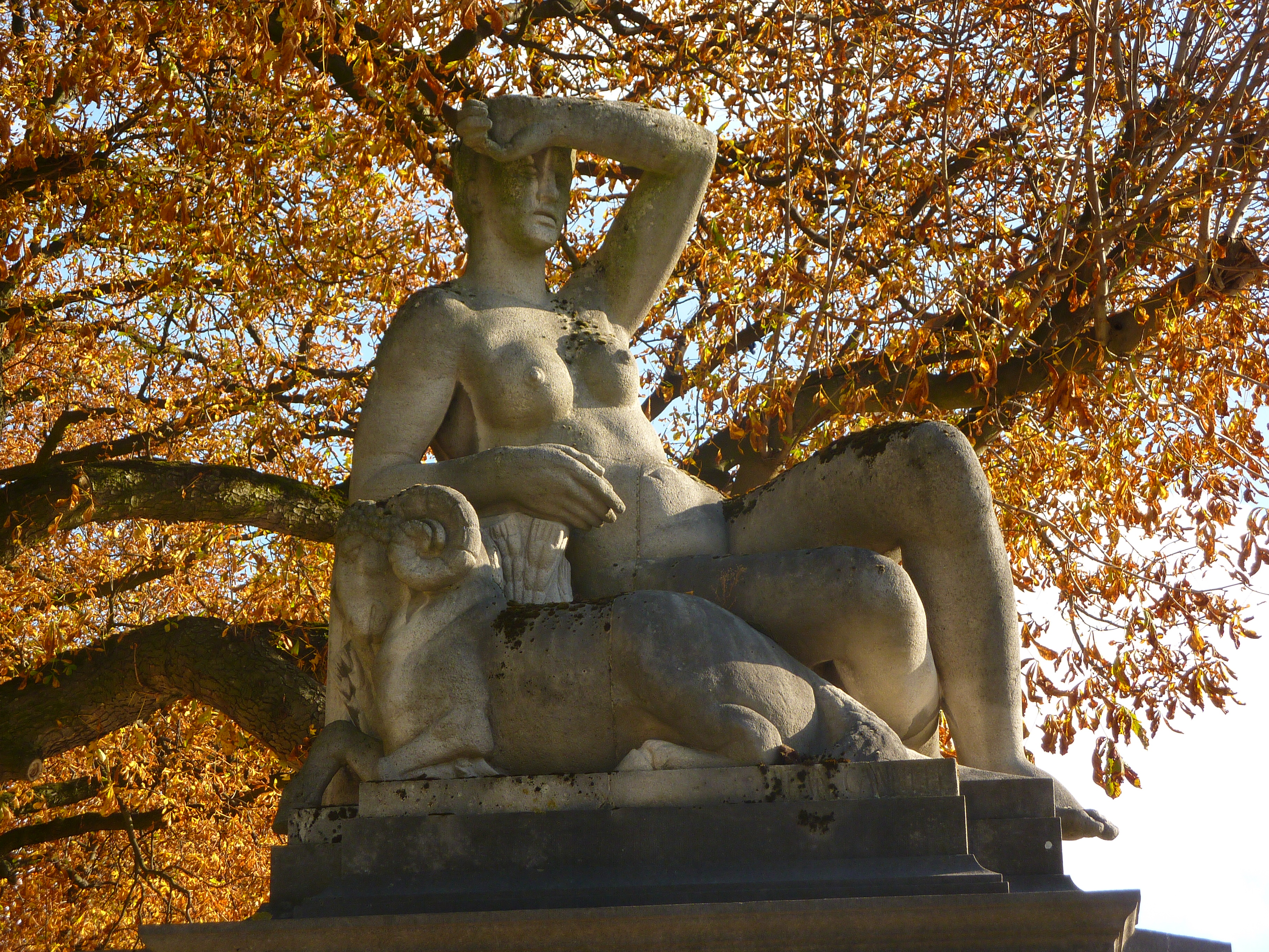 Parc du Cinquantenaire à Bruxelles, Belgique.